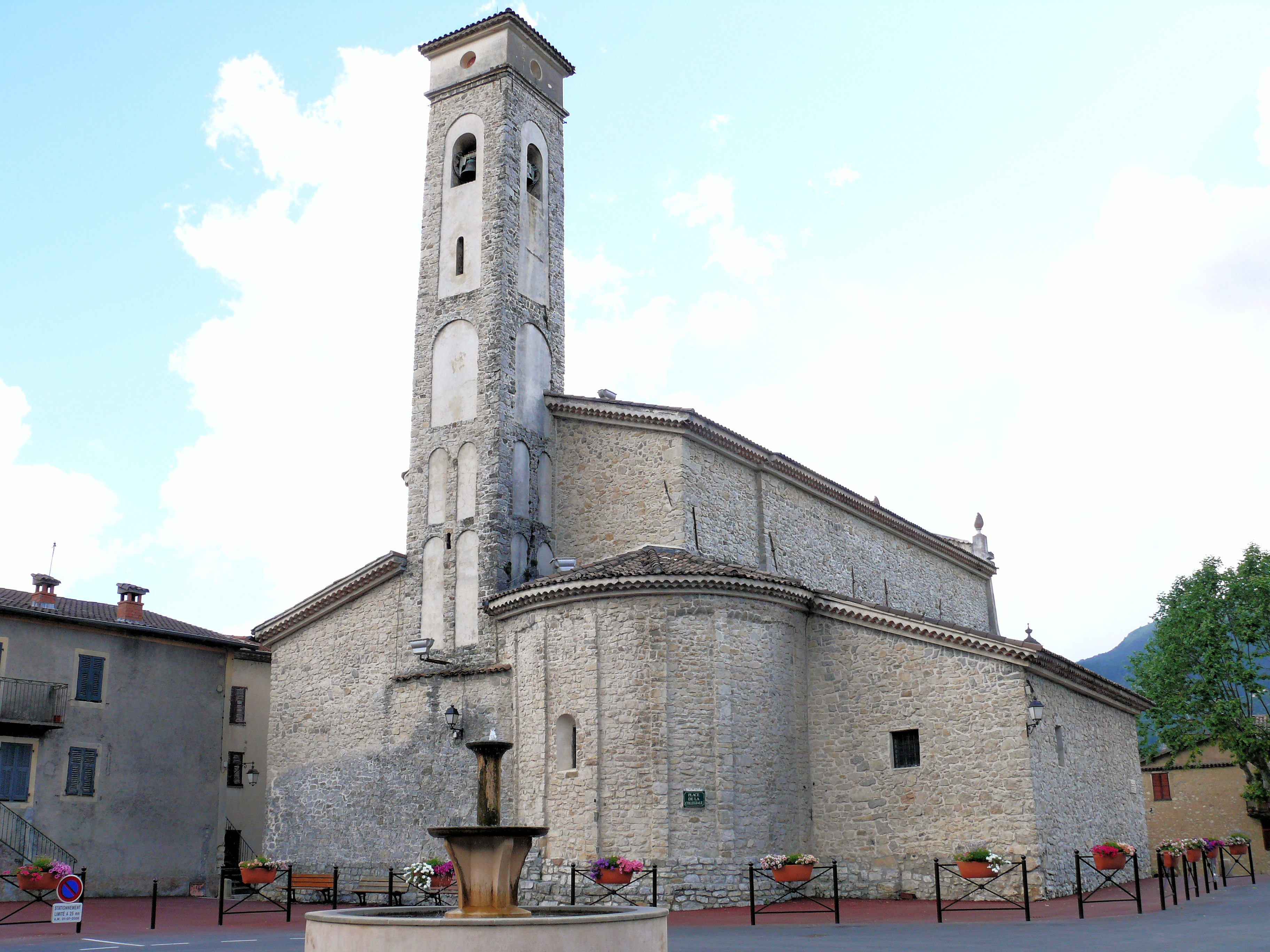 Clans (Alpes-Maritimes) - Collégiale Saint-Marie - Chevet roman et clocher de style lombard